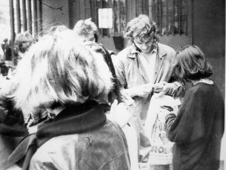 Codzienny gwar przed II LO, Poznań, III 1991r.